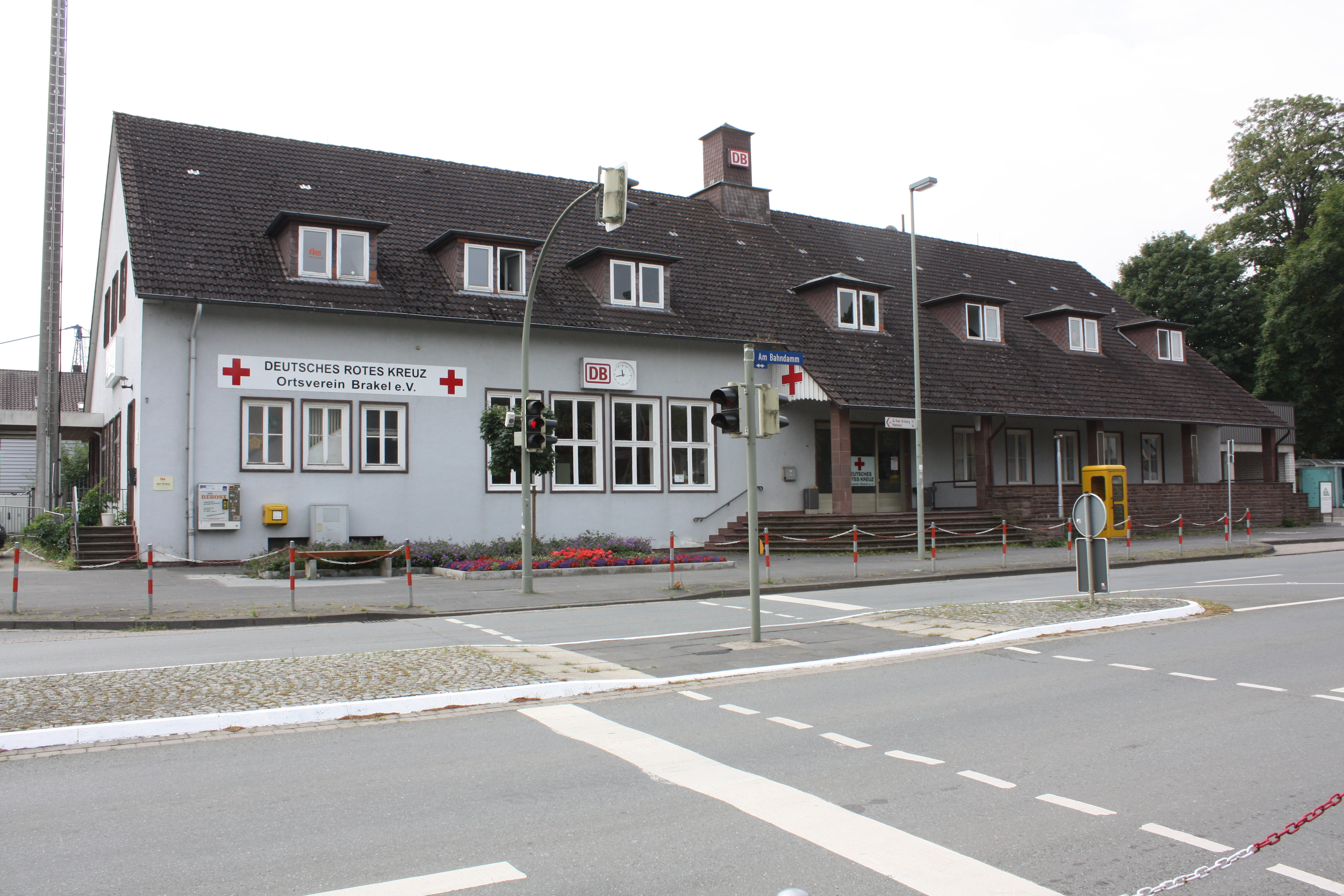 Hauptbahnhof in Brakel